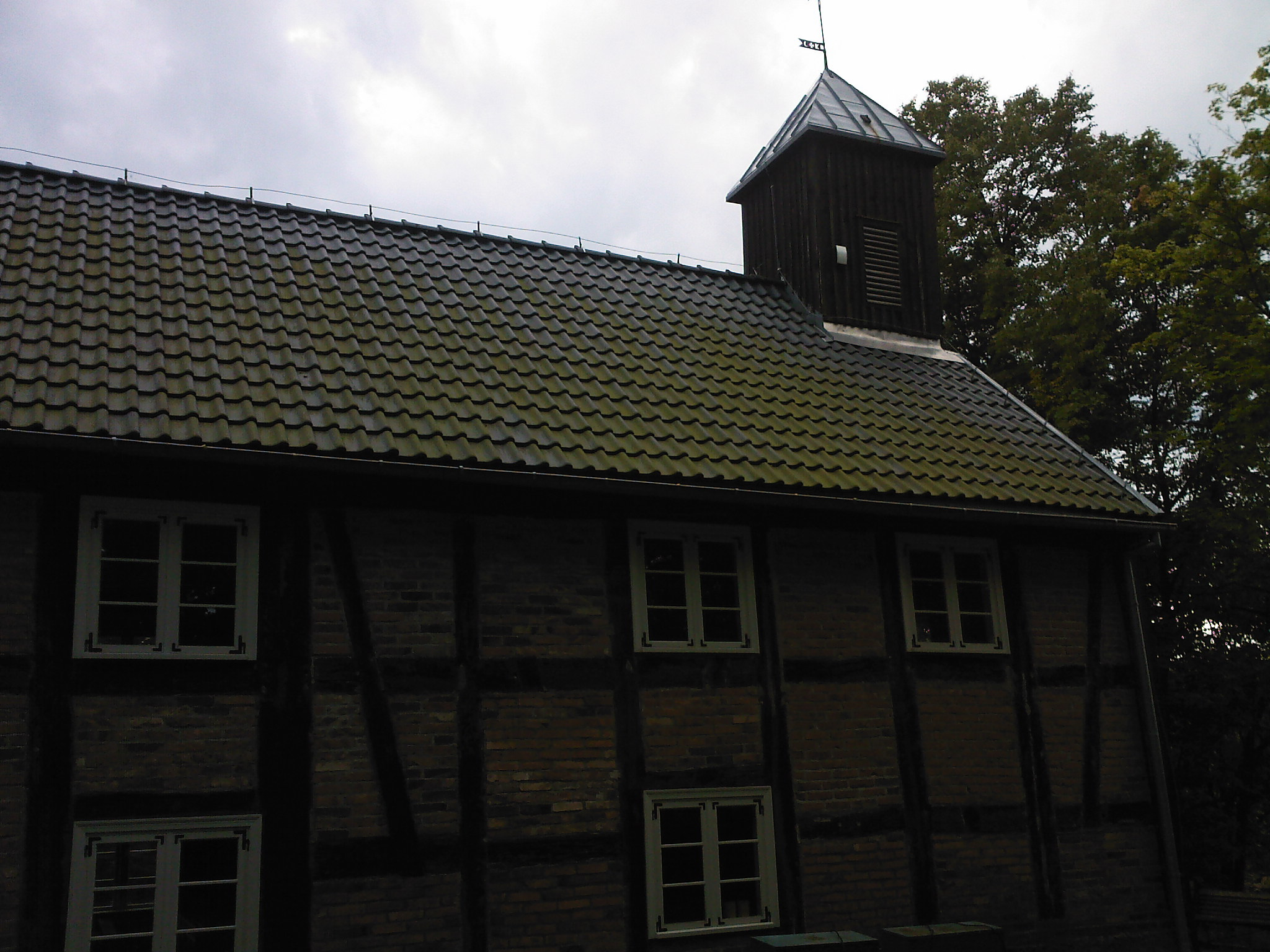 Kościół Św. Mikołaja w Czapielsku (woj. Pomorskie).